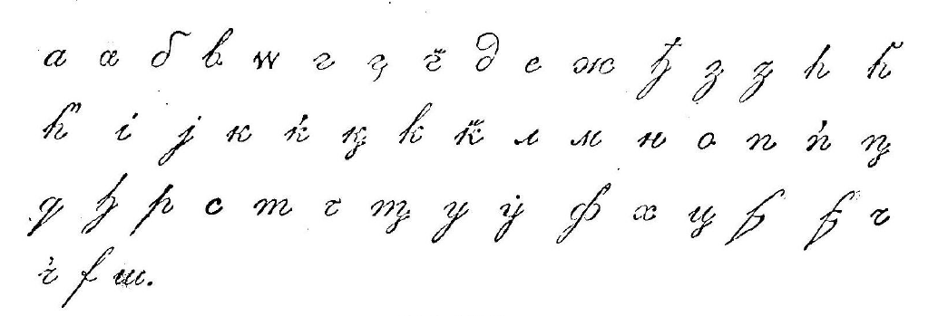 Lezgi alphabet from 1871 ABC book